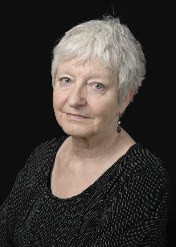 Claire Krähenbühl, écrivaine et éditrice, née le 3 septembre à Yverdon-les-Bains. Portrait réalisé à la BCU Lausanne, le 22 mars 2016.